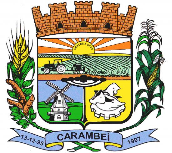 Brasão de Armas do município paranaense de Carambeí, Brasil.